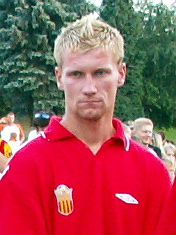 Marcin Drzymont - Korona Kielce player